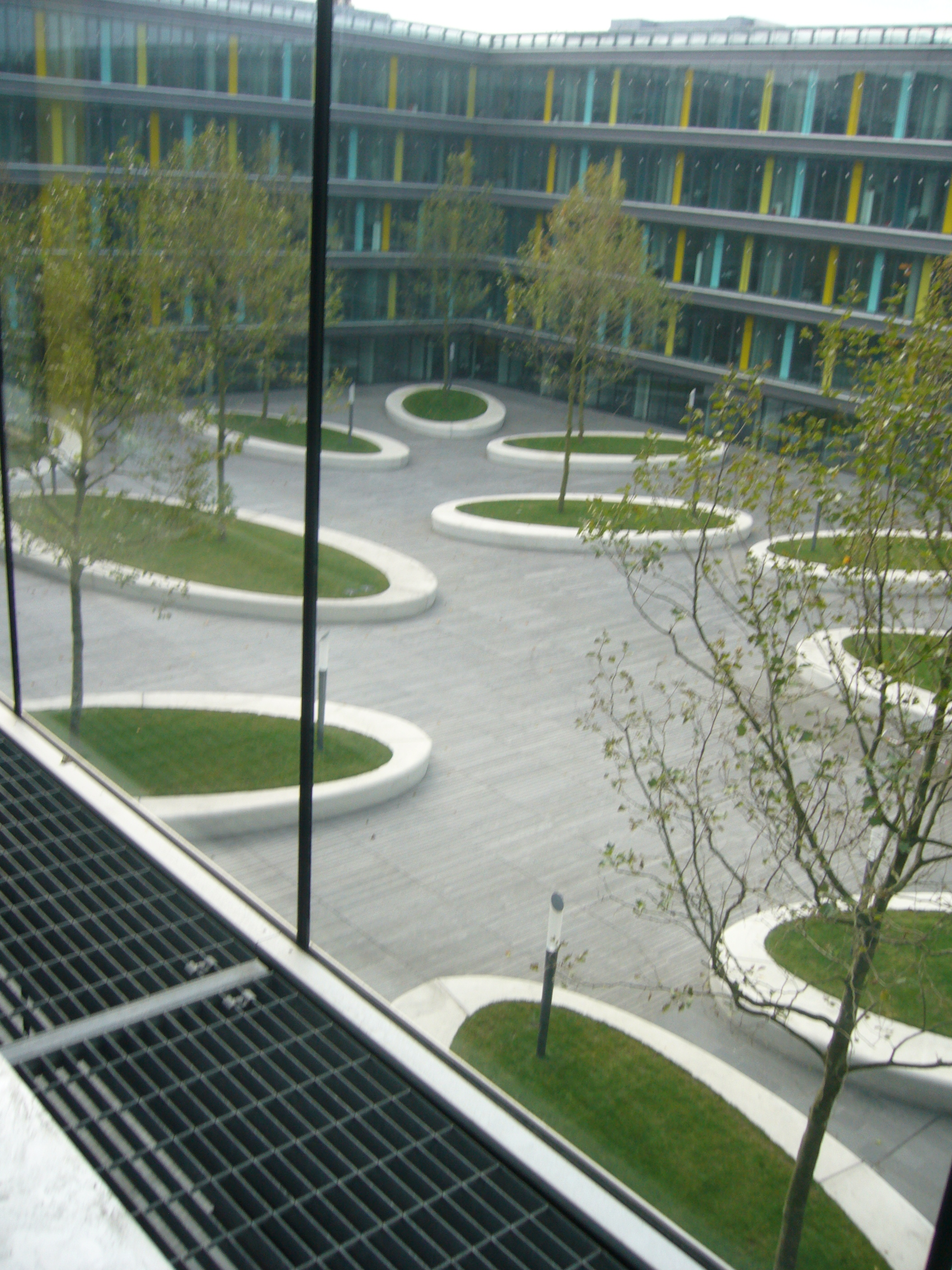 Platanenhof, de openbare tuin bij het vernieuwde Ministerie van Financiën